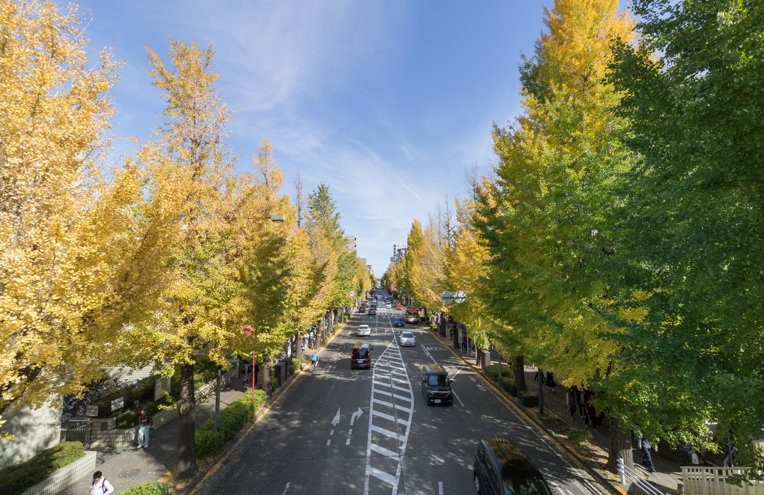 国道20号、高尾駅近くのイチョウ並木